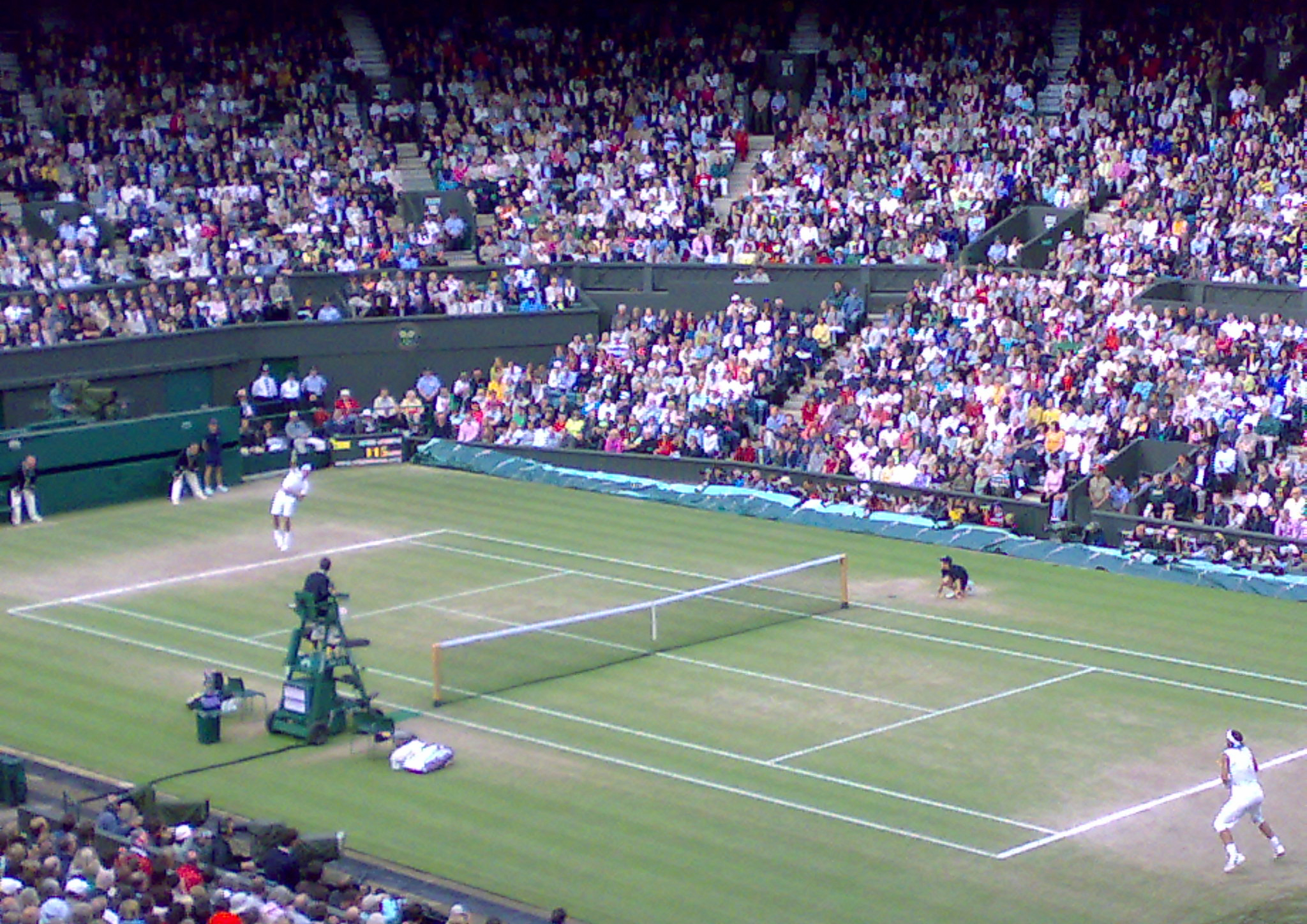 Wimbledon Men's final 2008, Federer serves for 3rd set